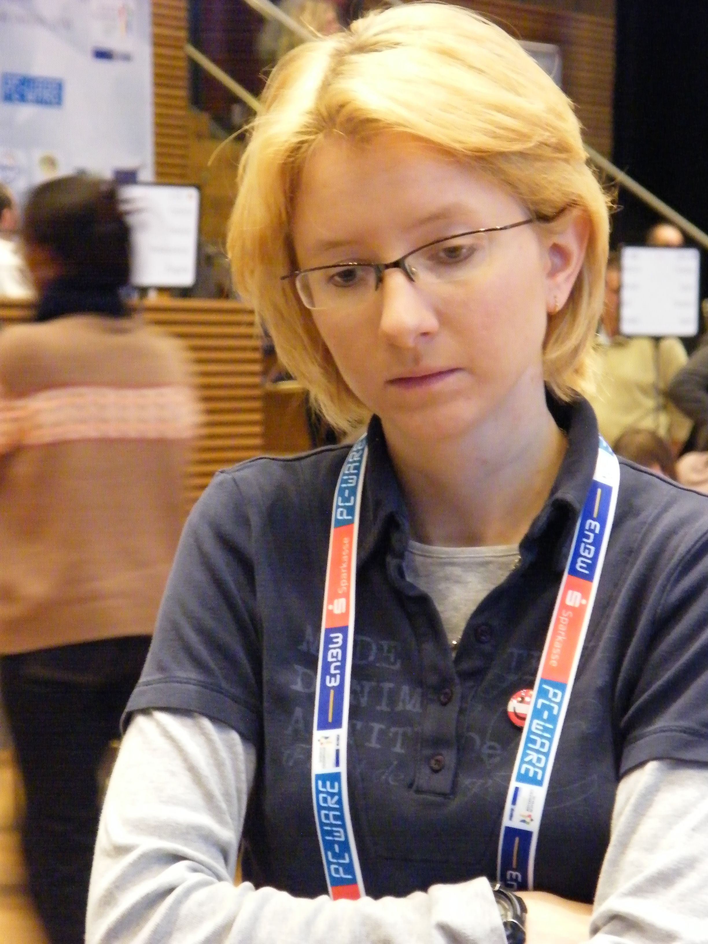 Eva Moser bei der 38. Schacholympiade in Dresden 2008